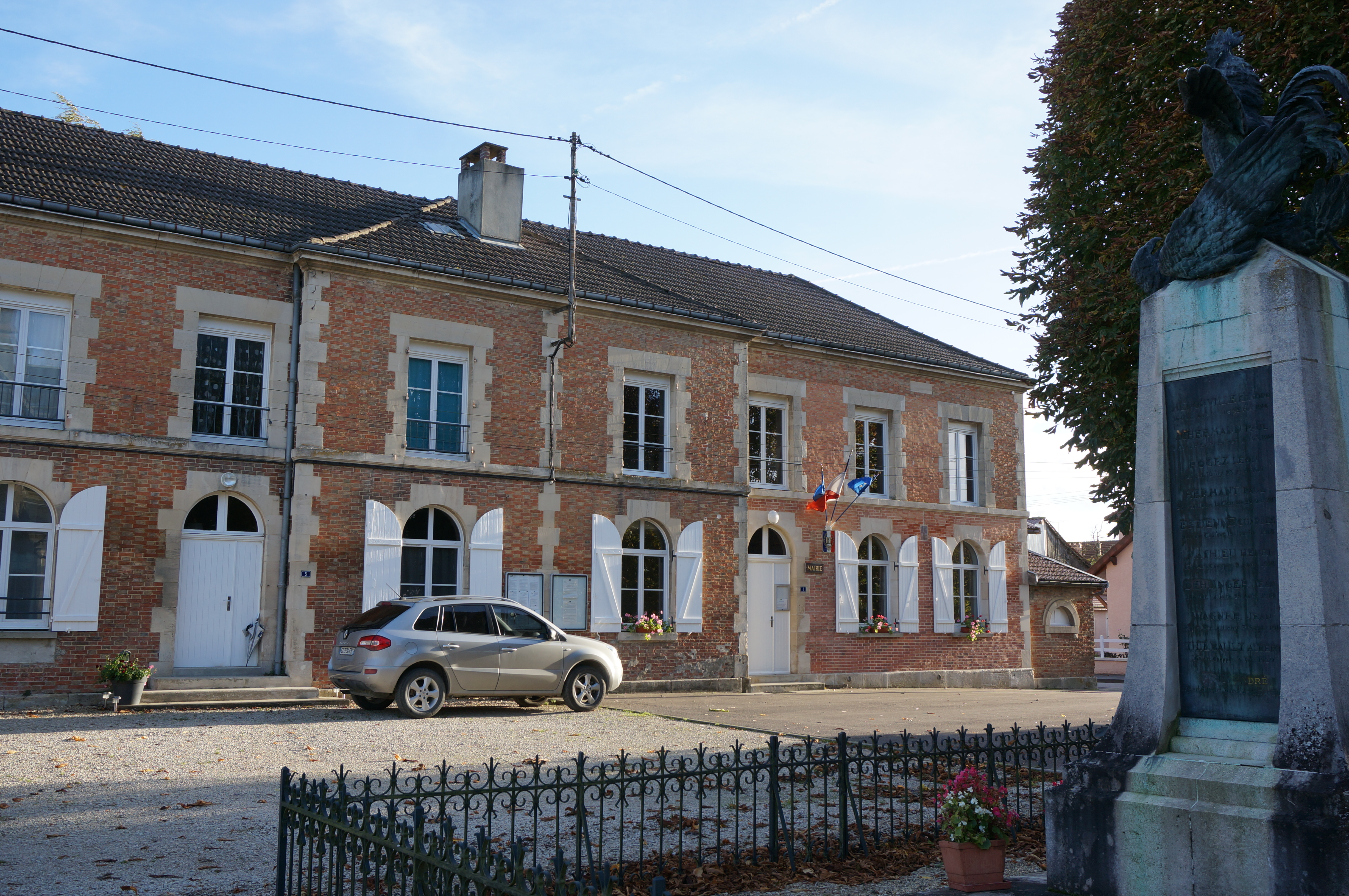 Vue de la mairie et du monument aux morts le Coq triomphant de l'Aigle .